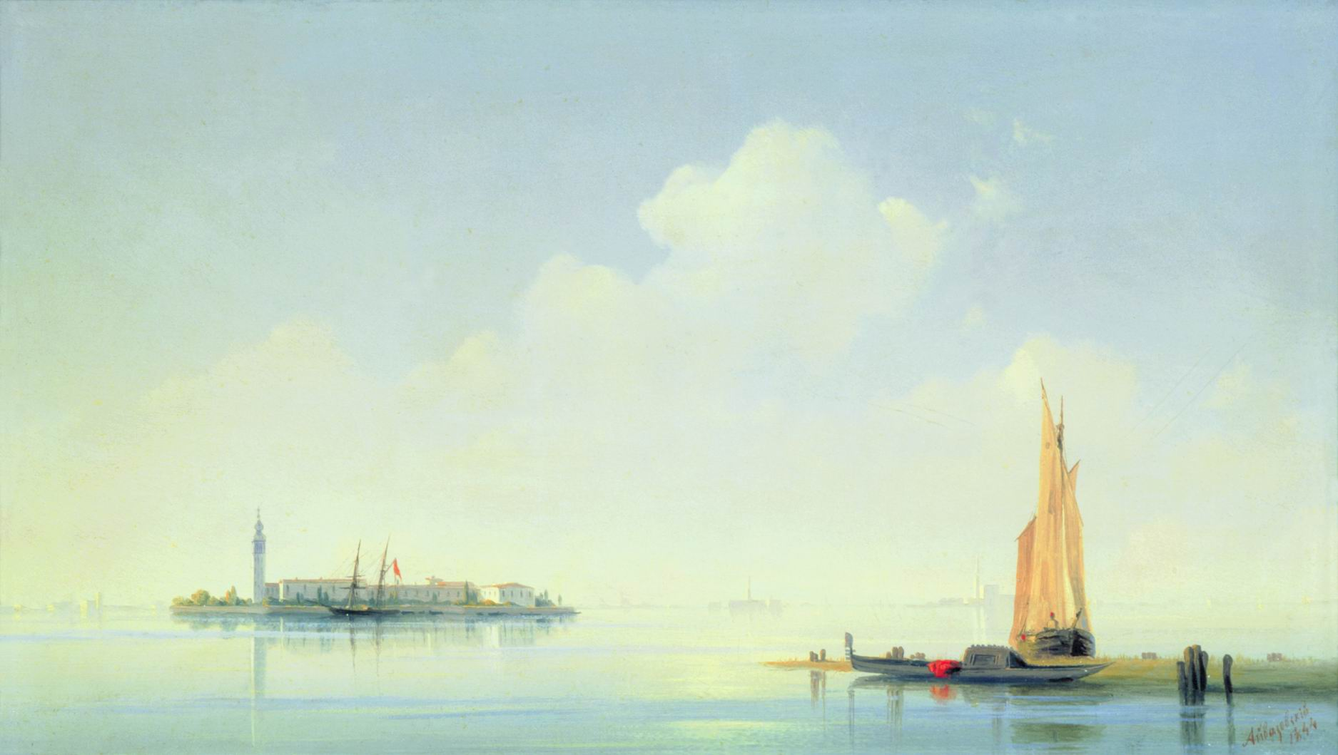 Венецианская лагуна. Вид на остров Сан-Джорджио. 1844 Дерево, масло. 22,5х34,5см. Государственная Третьяковская галерея, Москва